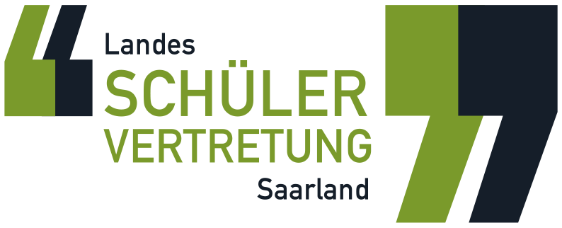 Logo der Landesschülervertretung des Saarlandes